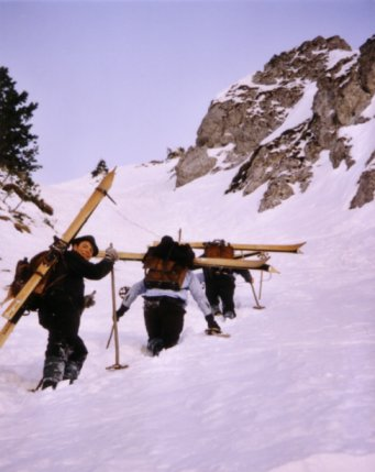 Trophée des Gastlosen 2004, de courageux participants font la course avec des skis en bois et des habits du début du siècle. Droits de la photo cédés au comité d'organisation de la manifestation.